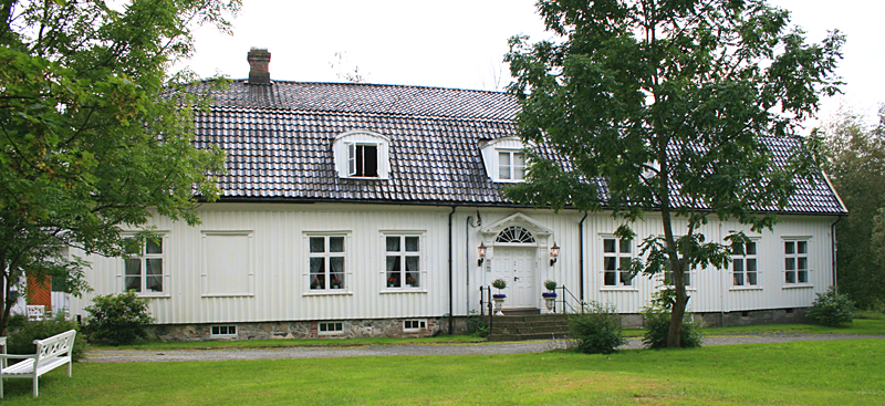 Våningshus, Hovland, Larvik. Freda.